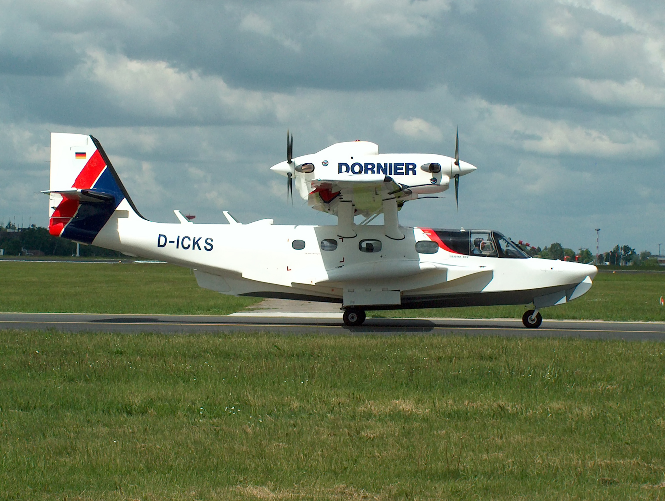 Aircraft: Dornier Seastar Airline: Dornier Seawings AG Registration: D-ICKS Location: Berlin-Schönefeld International Airport, Germany